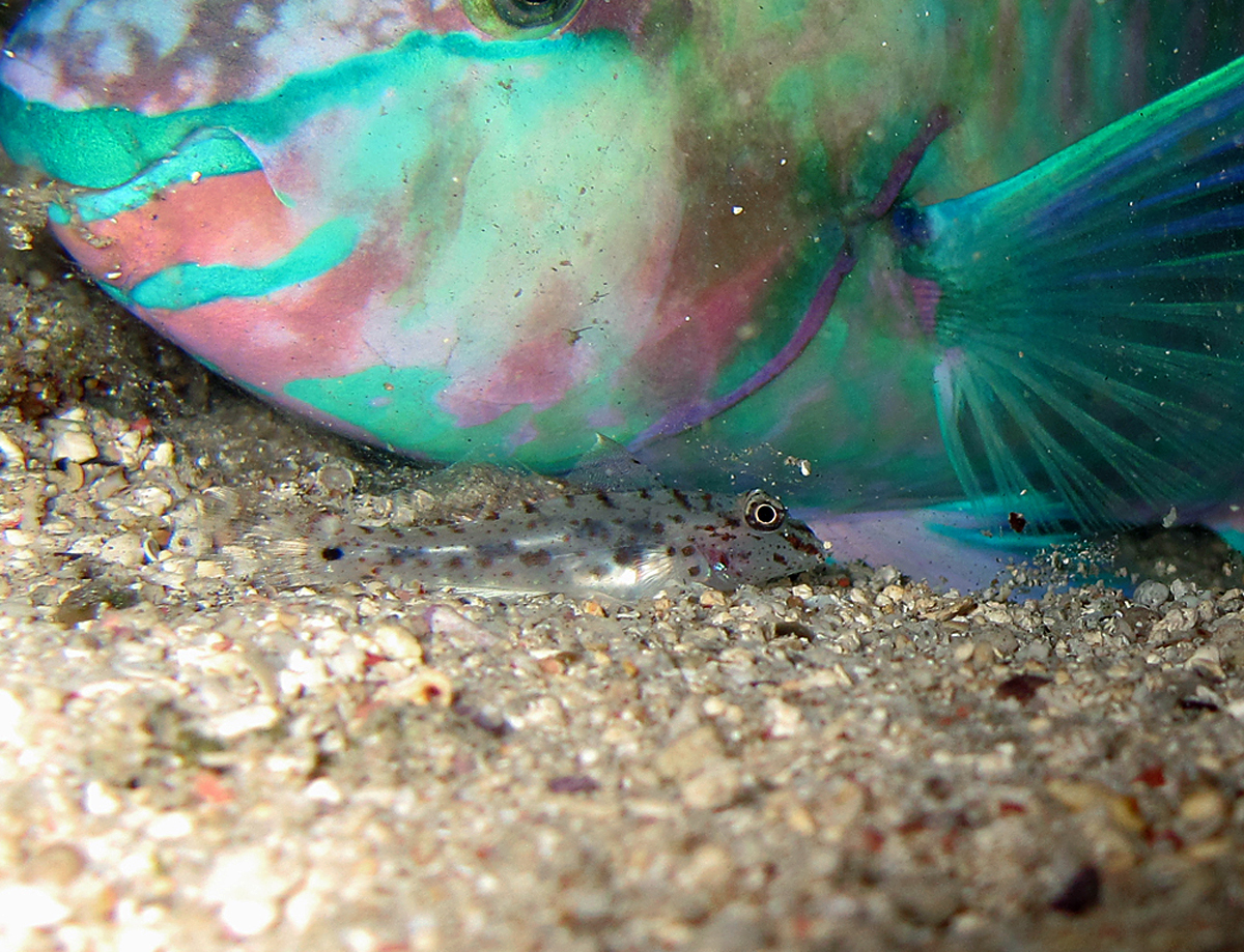 Un gobie Fusigobius maximus de nuit, dans un cocon de Scarus psittacus, à la Réunion.